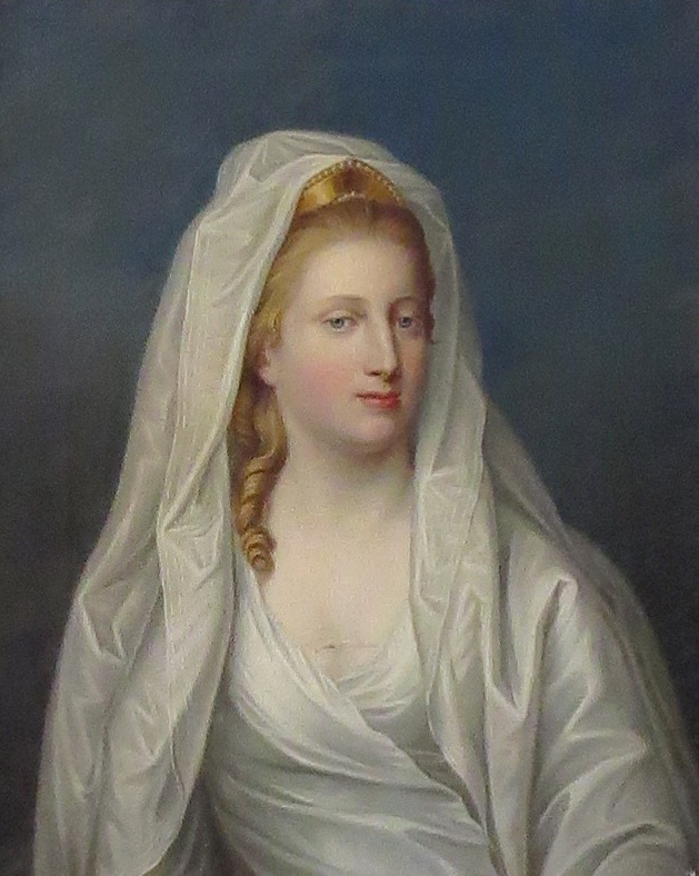 Maleri forstillende Caroline Mathilde, Glücksborg Slot